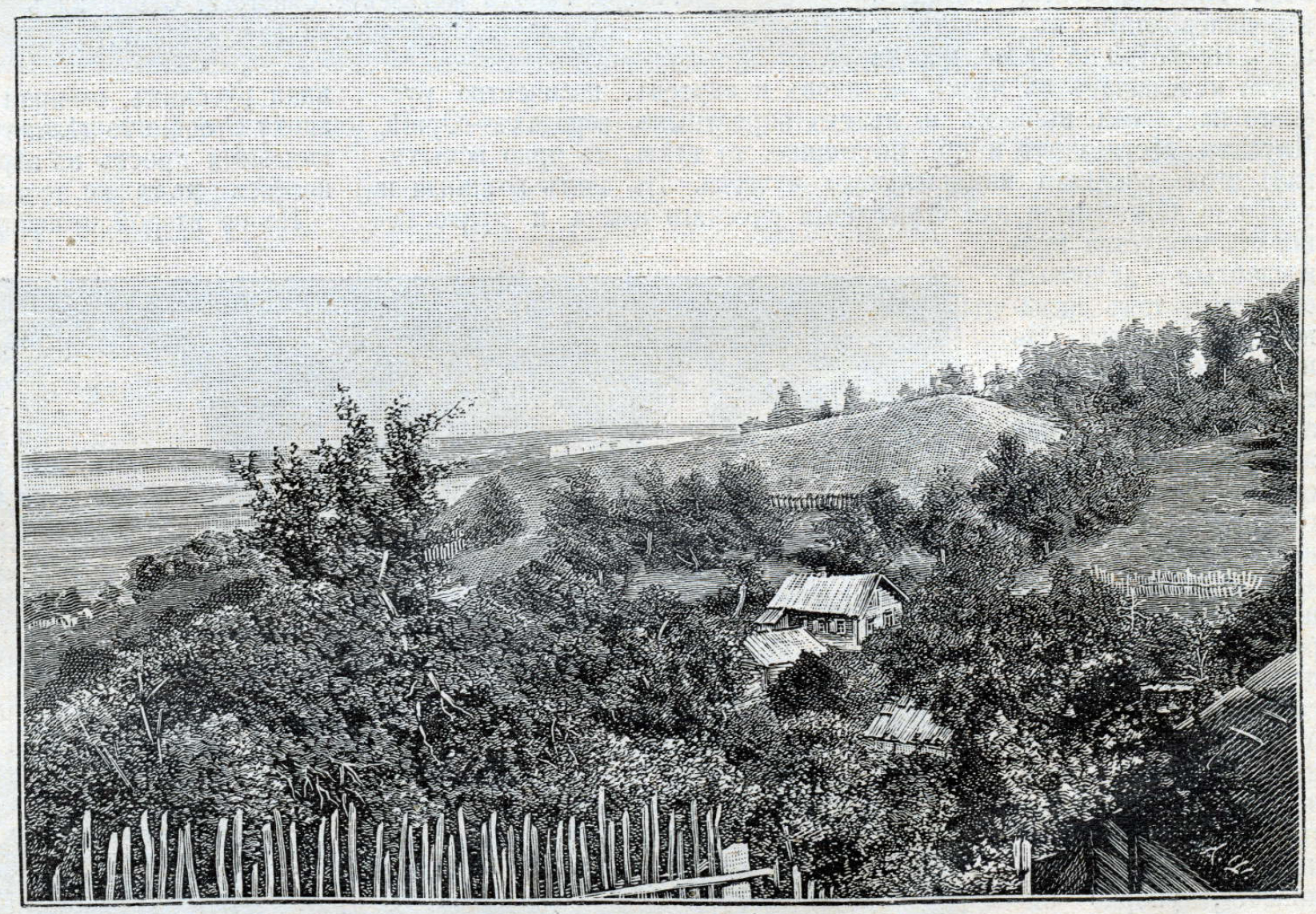 Беларуская (тарашкевіца): Амсьціслаў (Amścisłaŭ), Дзявочая гара (Dziavočaja hara)